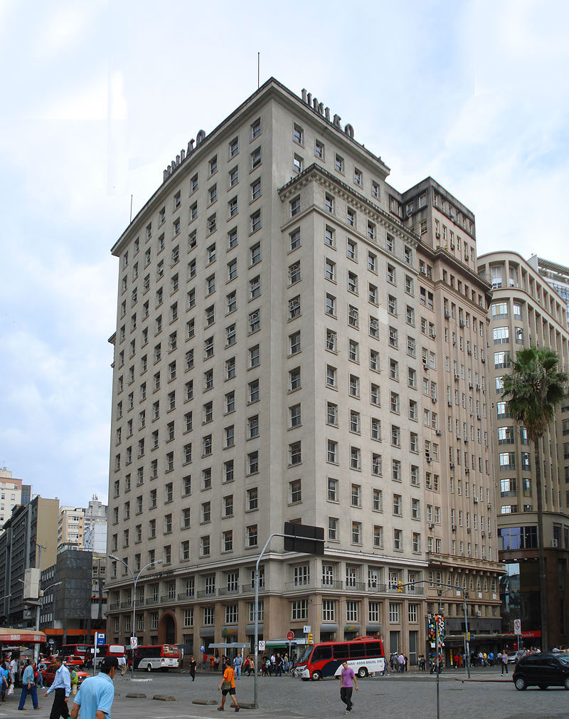 Edifício União, localizado na avenida Borges de Medeiros, no Centro de Porto Alegre